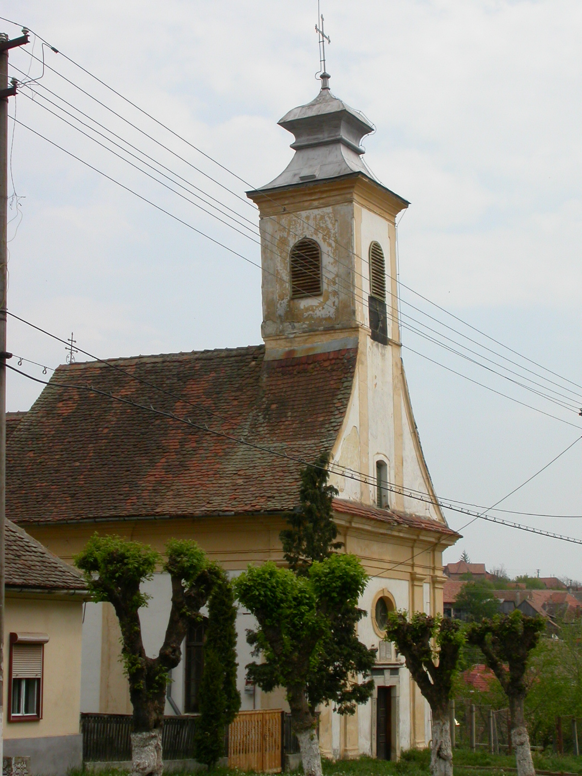 Biserica romano- catolică, 1765 - 1800